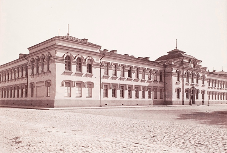 Выборгское реальное училище до расширения